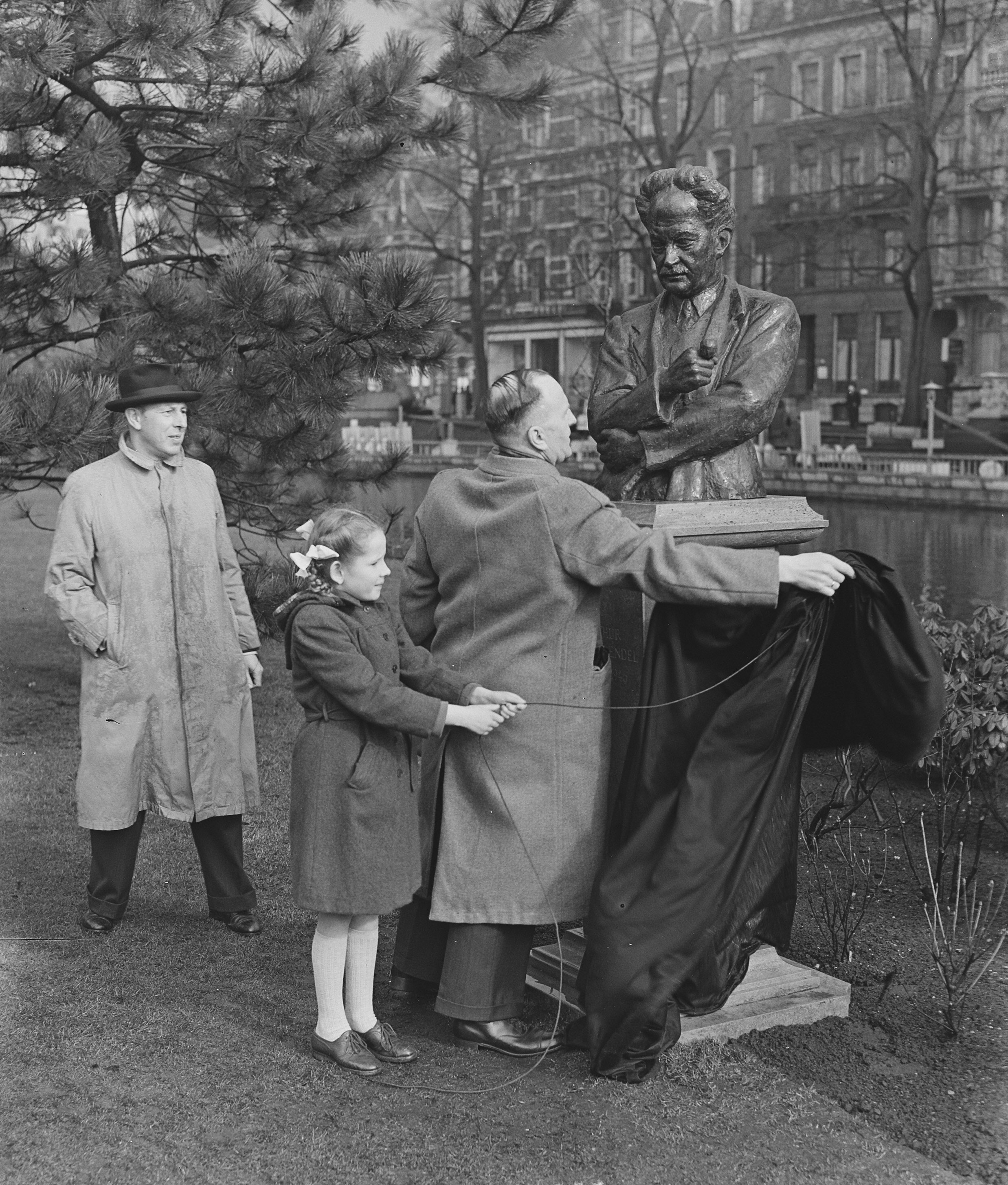 Collectie / Archief : Fotocollectie Anefo Reportage / Serie : [ onbekend ] Beschrijving : Onthulling van buste van Arthur van Schendel aan de Stadhouderskade te Amsterdam Annotatie : De ontwerper van het beeld is J.G. Wertheim Datum : 5 maart 1952 Locatie : Amsterdam, Noord-Holland Trefwoorden : auteurs, beeldhouwwerken, onthullingen, schrijvers Persoonsnaam : Schendel, Arthur van Fotograaf : Pot, Harry / Anefo, [onbekend] Auteursrechthebbende : Nationaal Archief Materiaalsoort : Glasnegatief Nummer archiefinventaris : bekijk toegang 2.24.01.09 Bestanddeelnummer : 904-9950